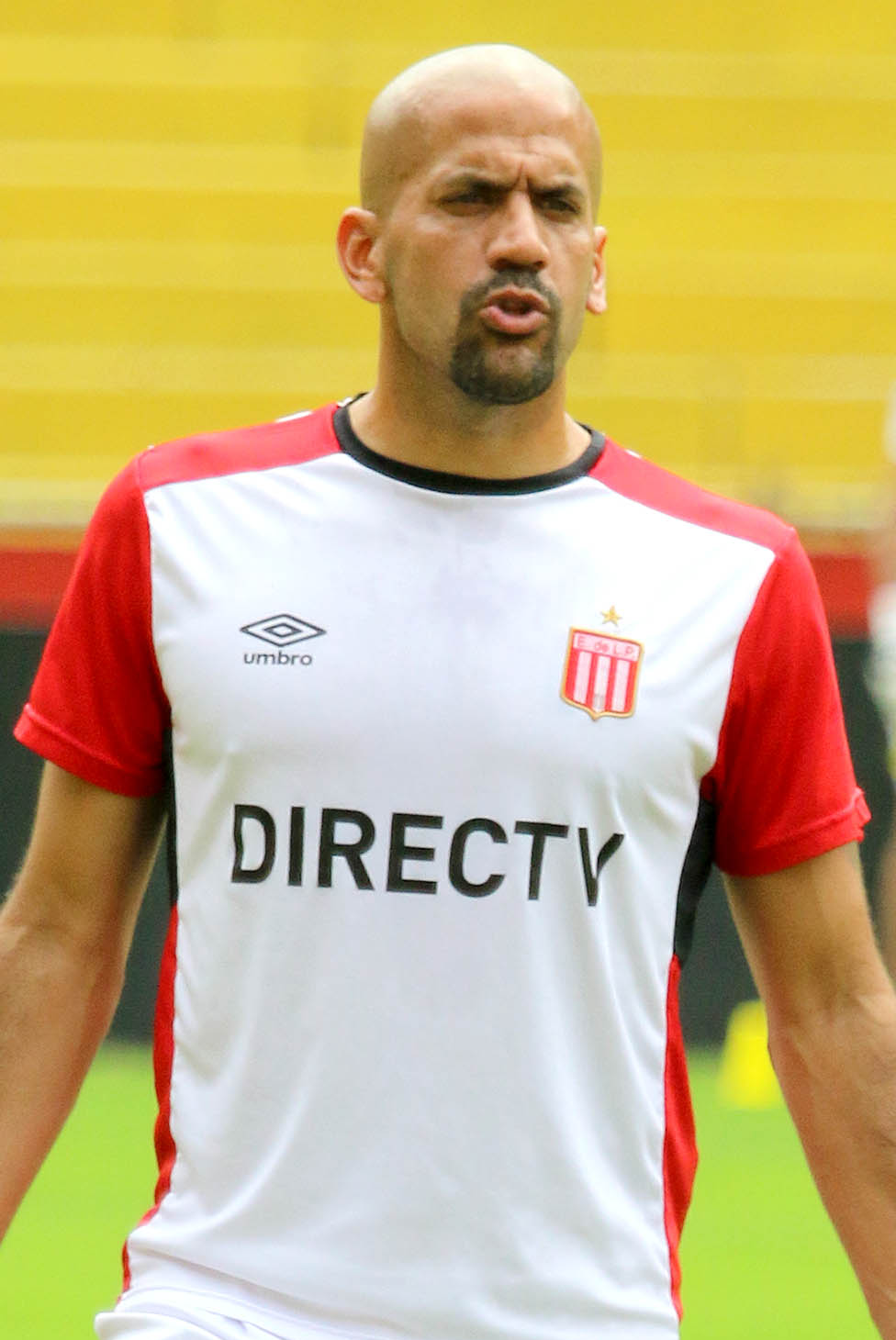 Guayaquil, miércoles 17 de mayo del 2017 (Andes).-El equipo argentino Estudiantes de la Plata entrenó esta mañana en la cancha del estadio Monumental de Guayaquil, el equipo "Pincharrata" se enfrenta este jueves a Barcelona de Ecuador, por la Copa Libertadores. En la gráfica Juan Sebastian Verón, Presidente y jugador del club. Foto:Andes/César Muñoz